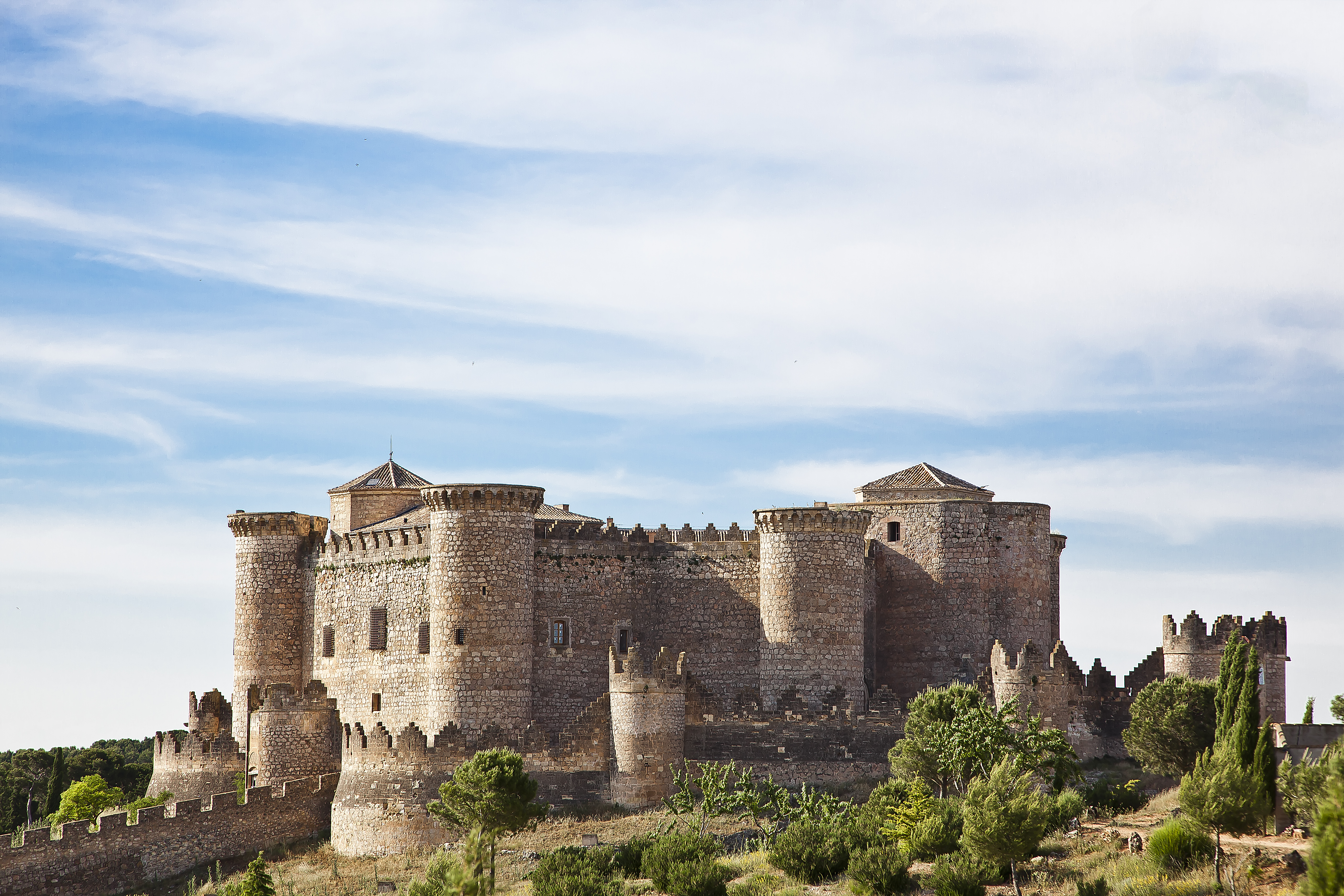 Castillo de Belmonte. Cuenca